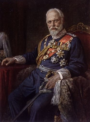 König Ludwig III. von Bayern als Prinzregent, gemalt von Walter Firle (1859-1929)